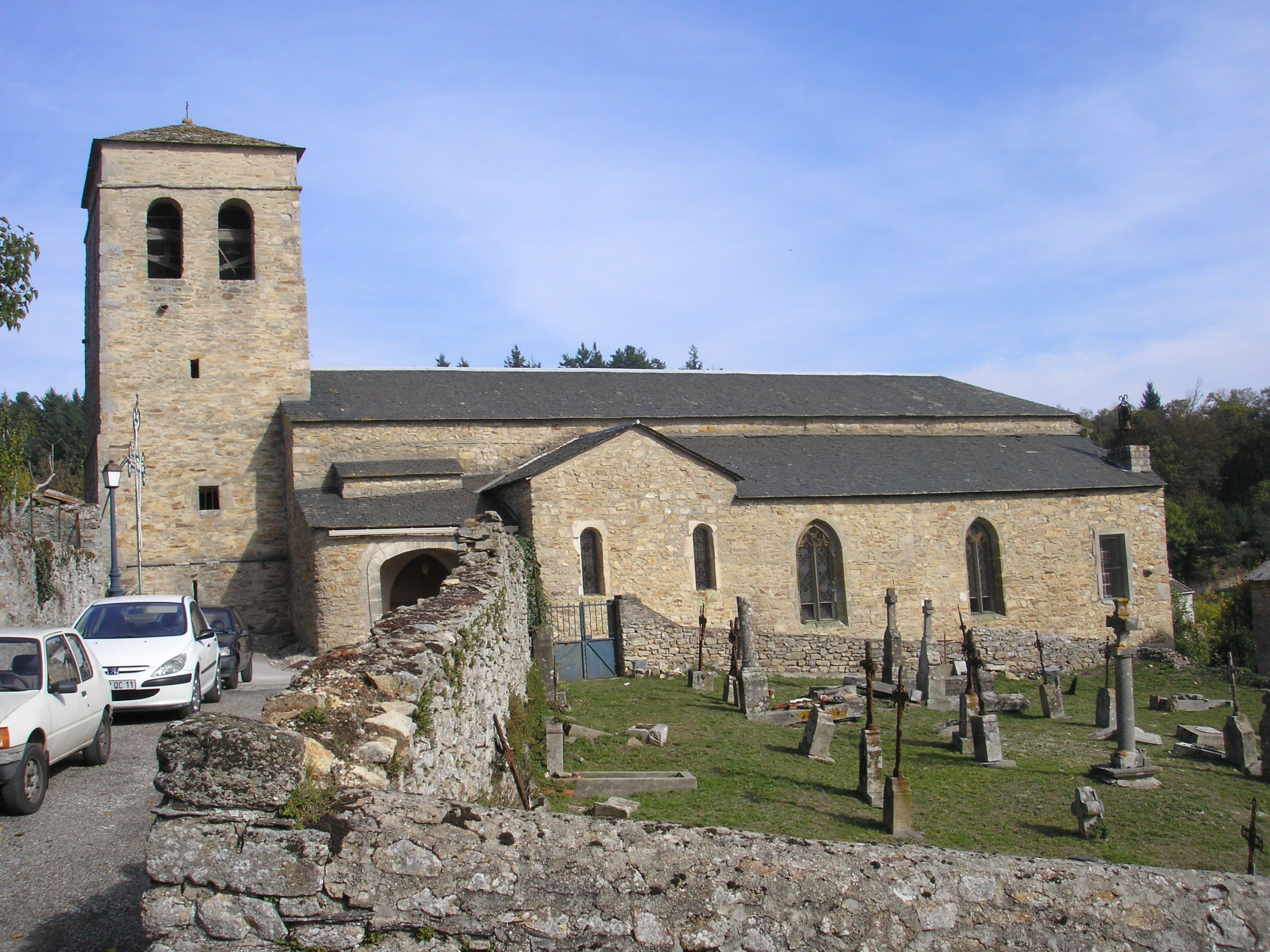 L'église Saint-Clément (XVe-XVIe) à Fontiers-Cabardès en novembre 2009.